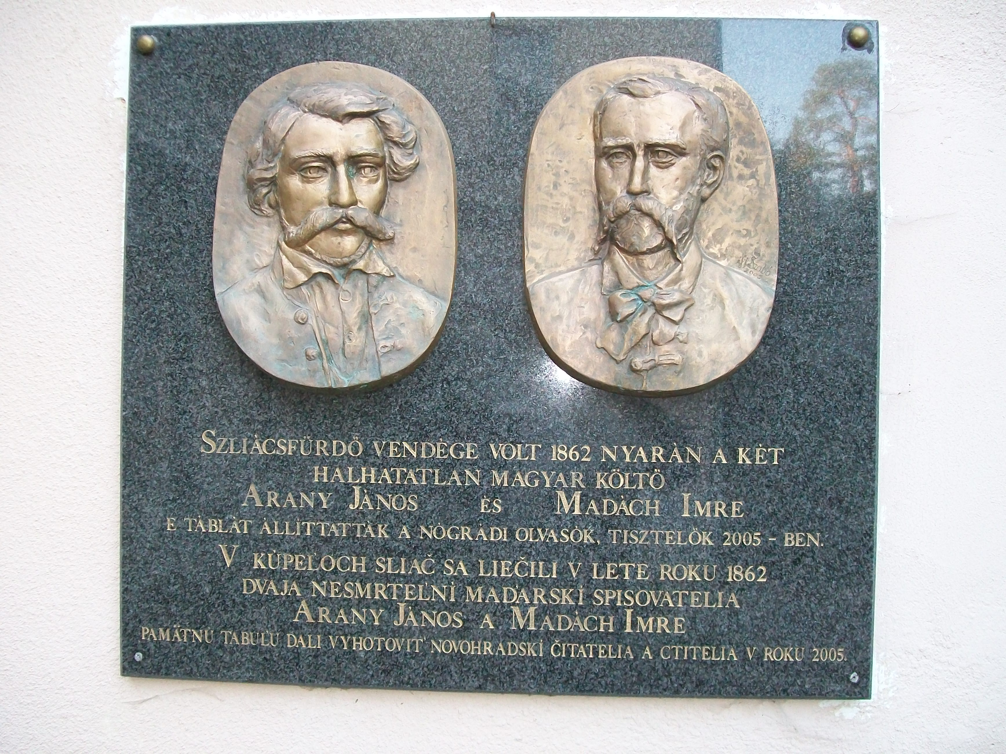 Pamätná tabuľa slávnych maďarských spisovateľov